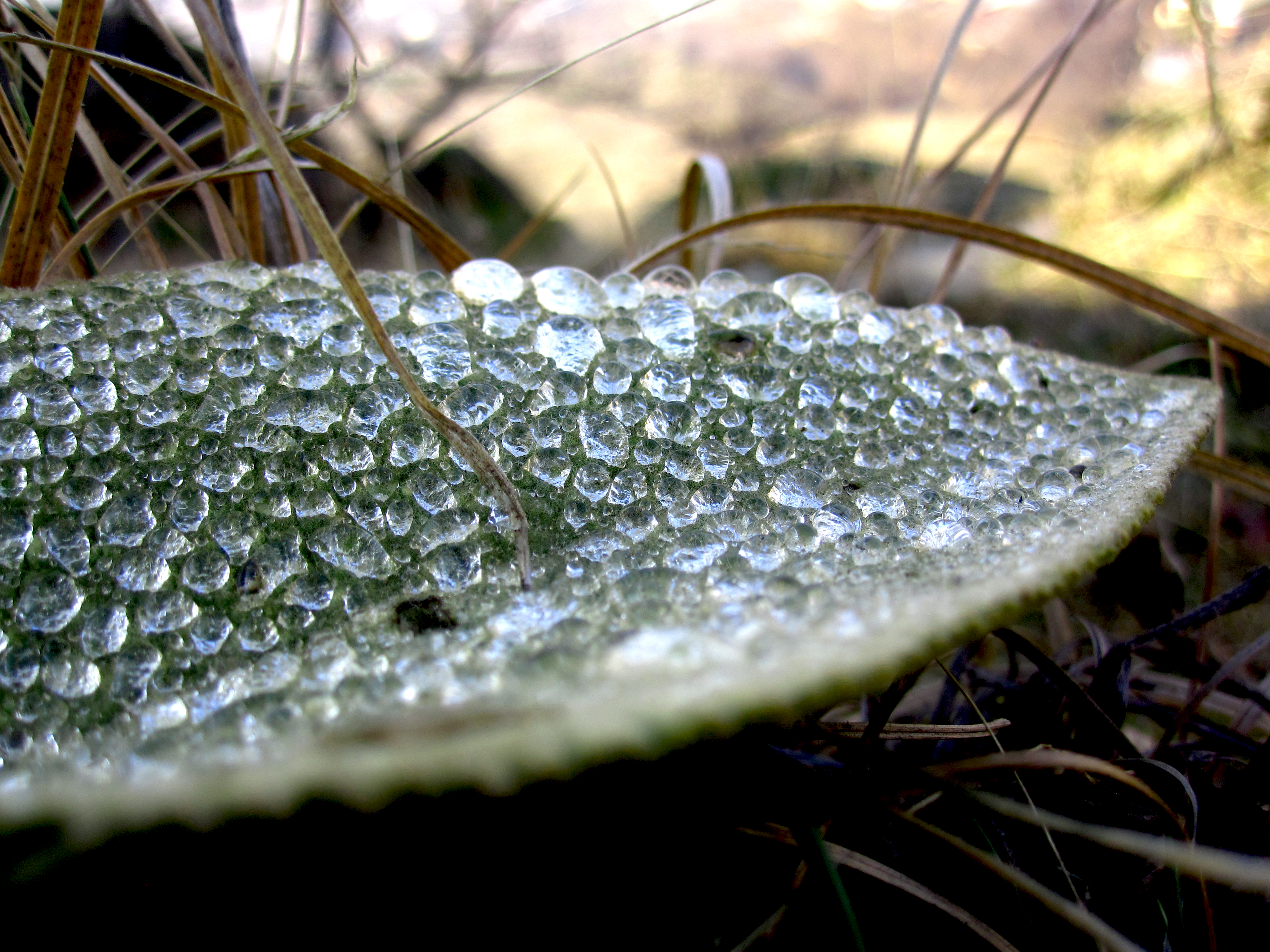 Капки на лист - фотографирани на ридот од с. Мажучиште, Прилеп.